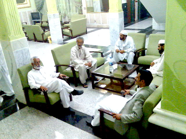 محلی برای جشنها